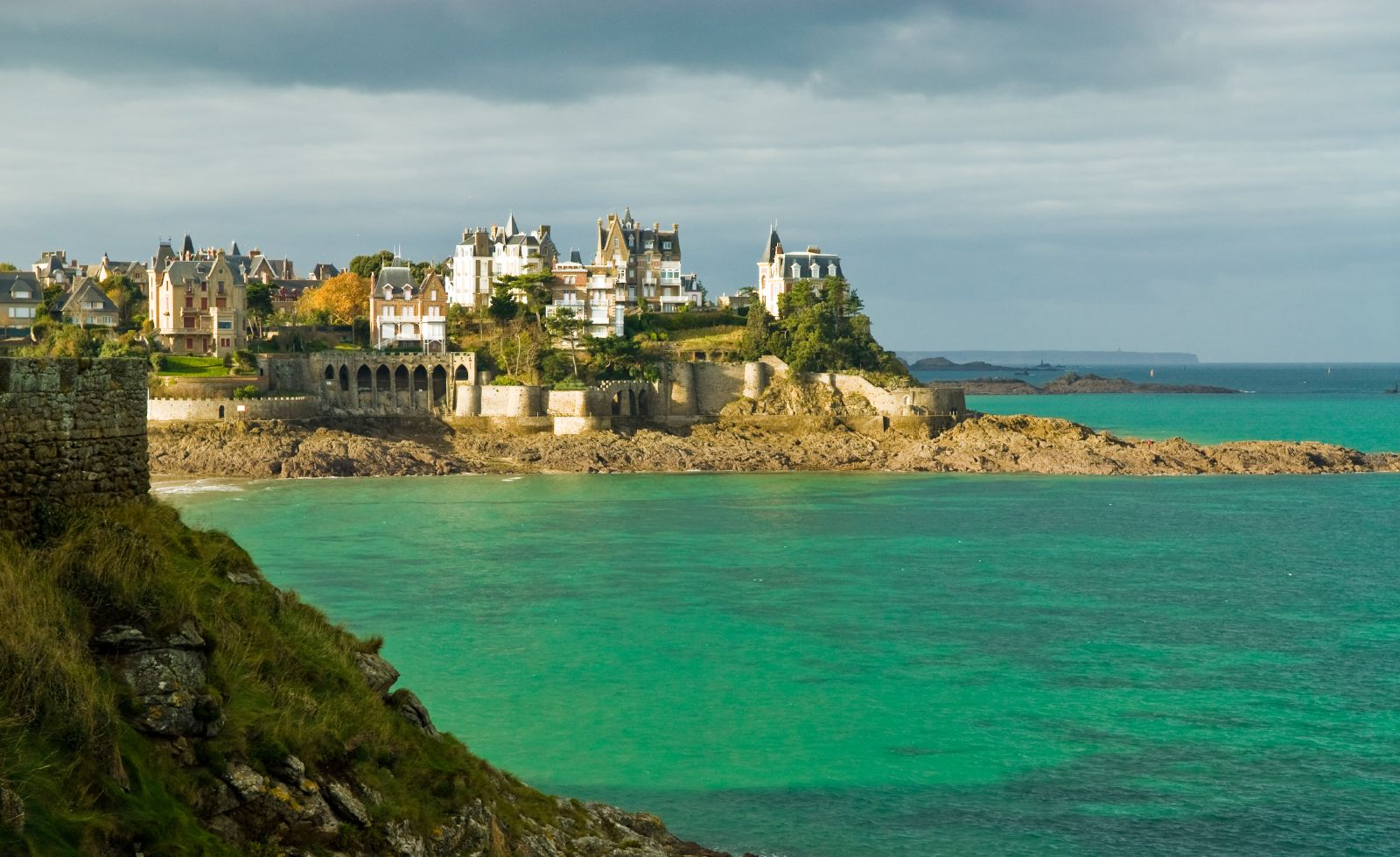 Dinard - Promenade du moulinet vue sur la Malouine